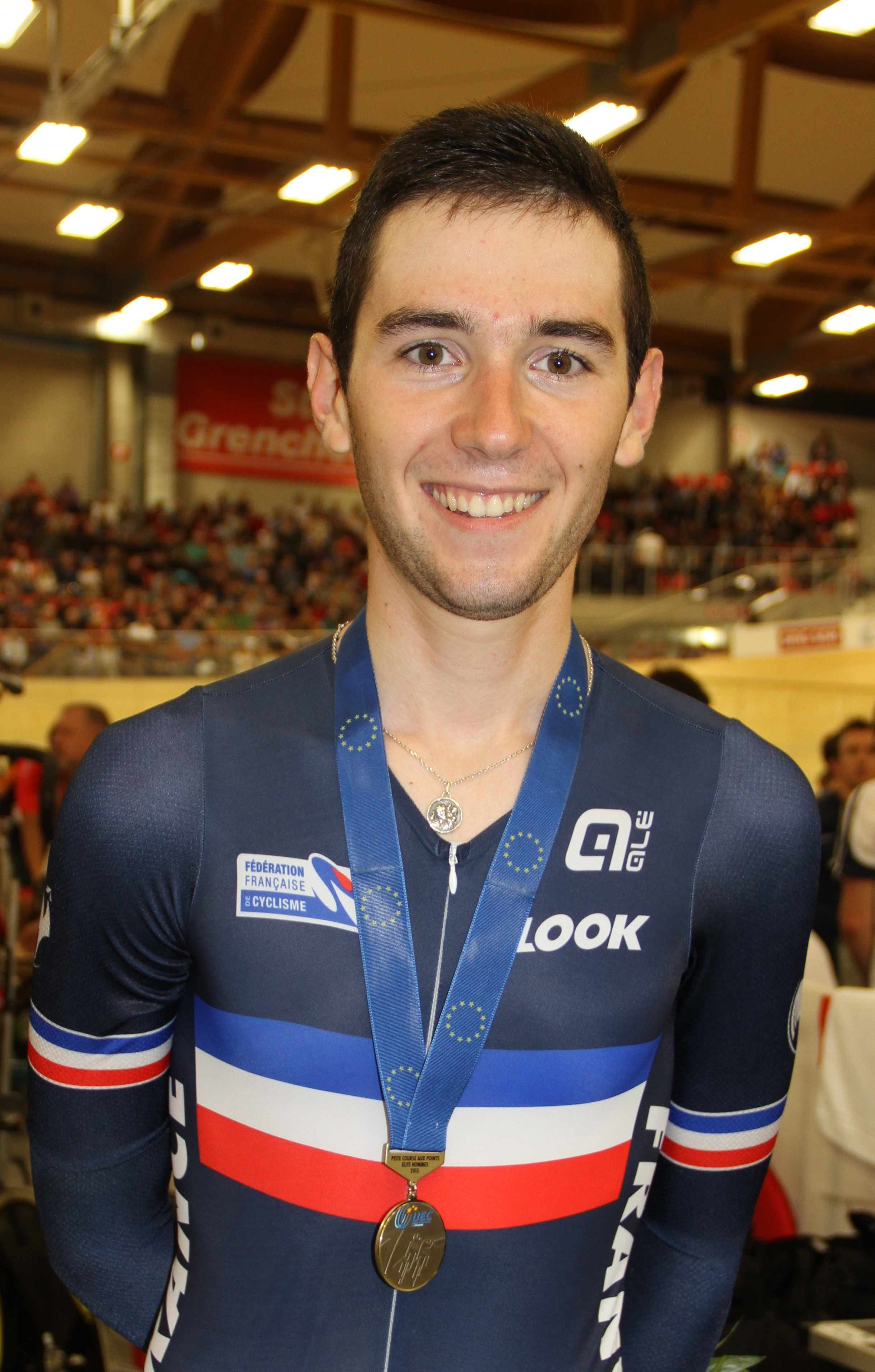 Benjamin Thomas, franz. Radsportler, Silber im Punktefahren The making of this document was supported by the Community-Budget of Wikimedia Germany.